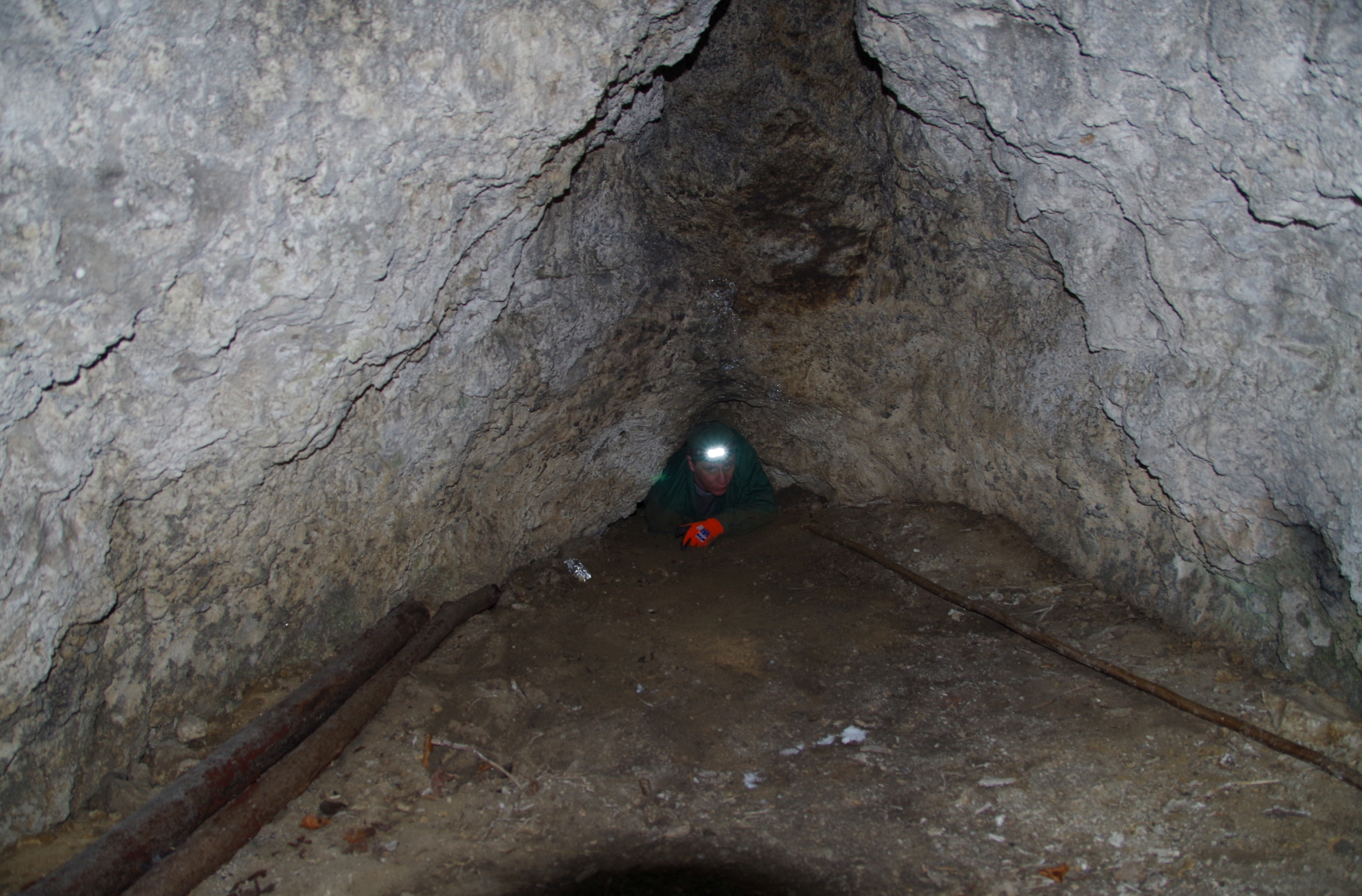 Schronisko Południowe. Niewielka salka i wejście do lewego korytarza